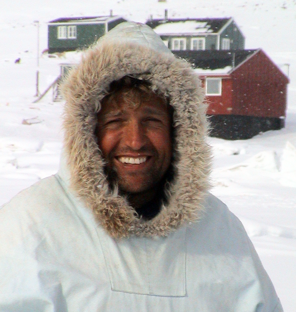 Explorador polar